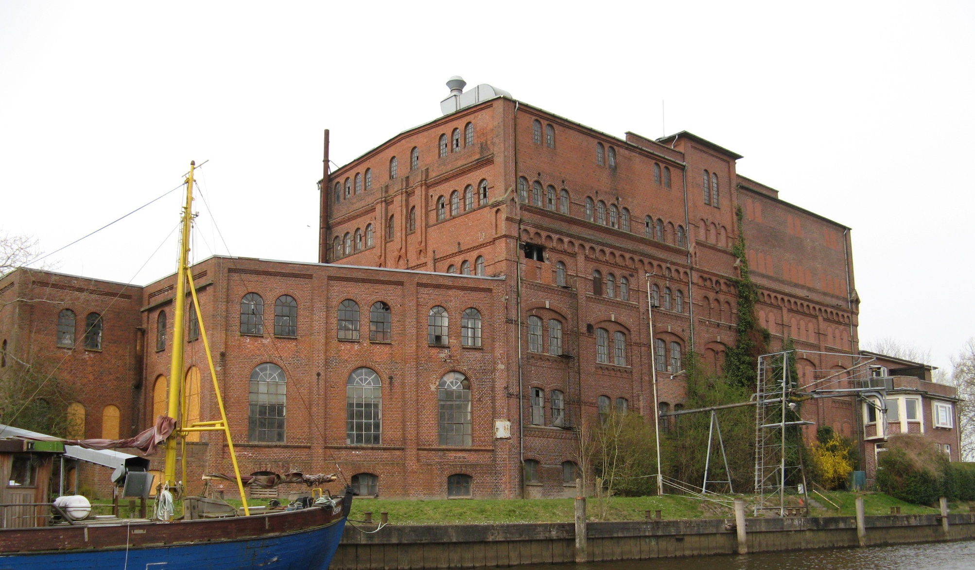 Ex-Eidermühle Friedrichstadt Author: Dirk Ingo Franke